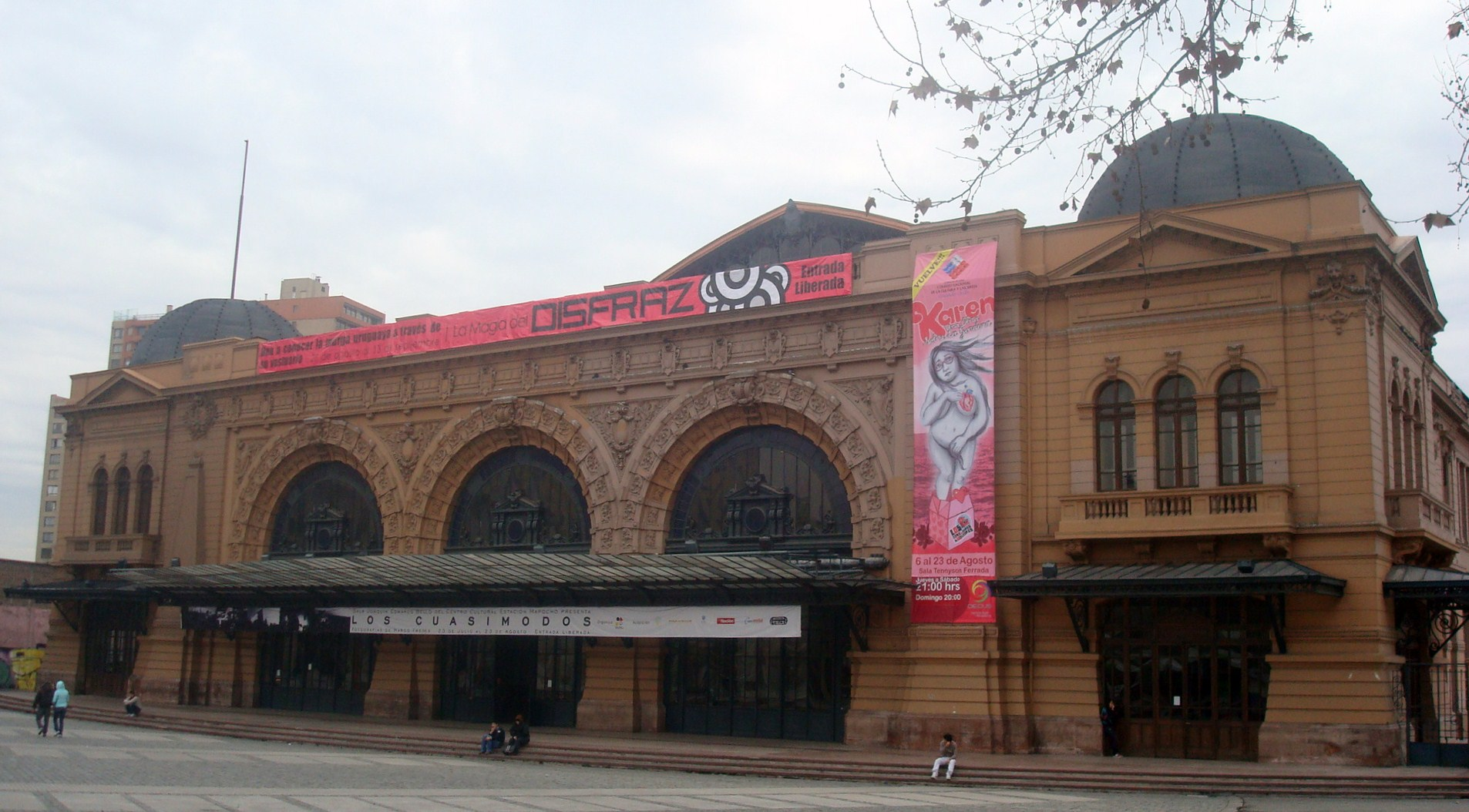 Centro Cultural Estación Mapocho, Santiago Centro, Santiago de Chile